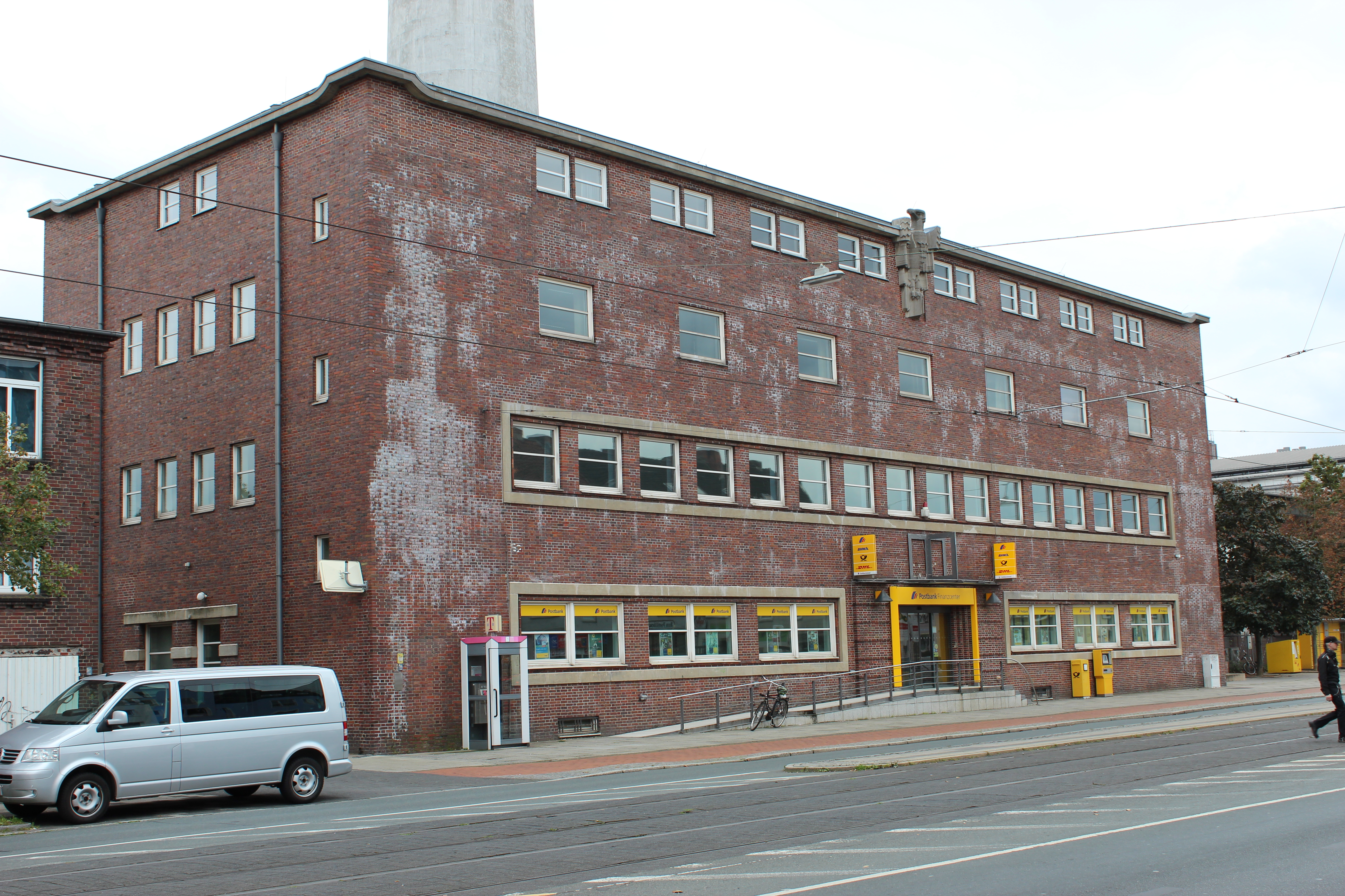 Postamt 15 in Bremen, Utbremer Straße 97, 98, 99.Das abgebildete Objekt ist ein geschütztes Kulturdenkmal in der Freien Hansestadt Bremen, mit der Nr. 1183 beim Landesamt für Denkmalpflege registriert.